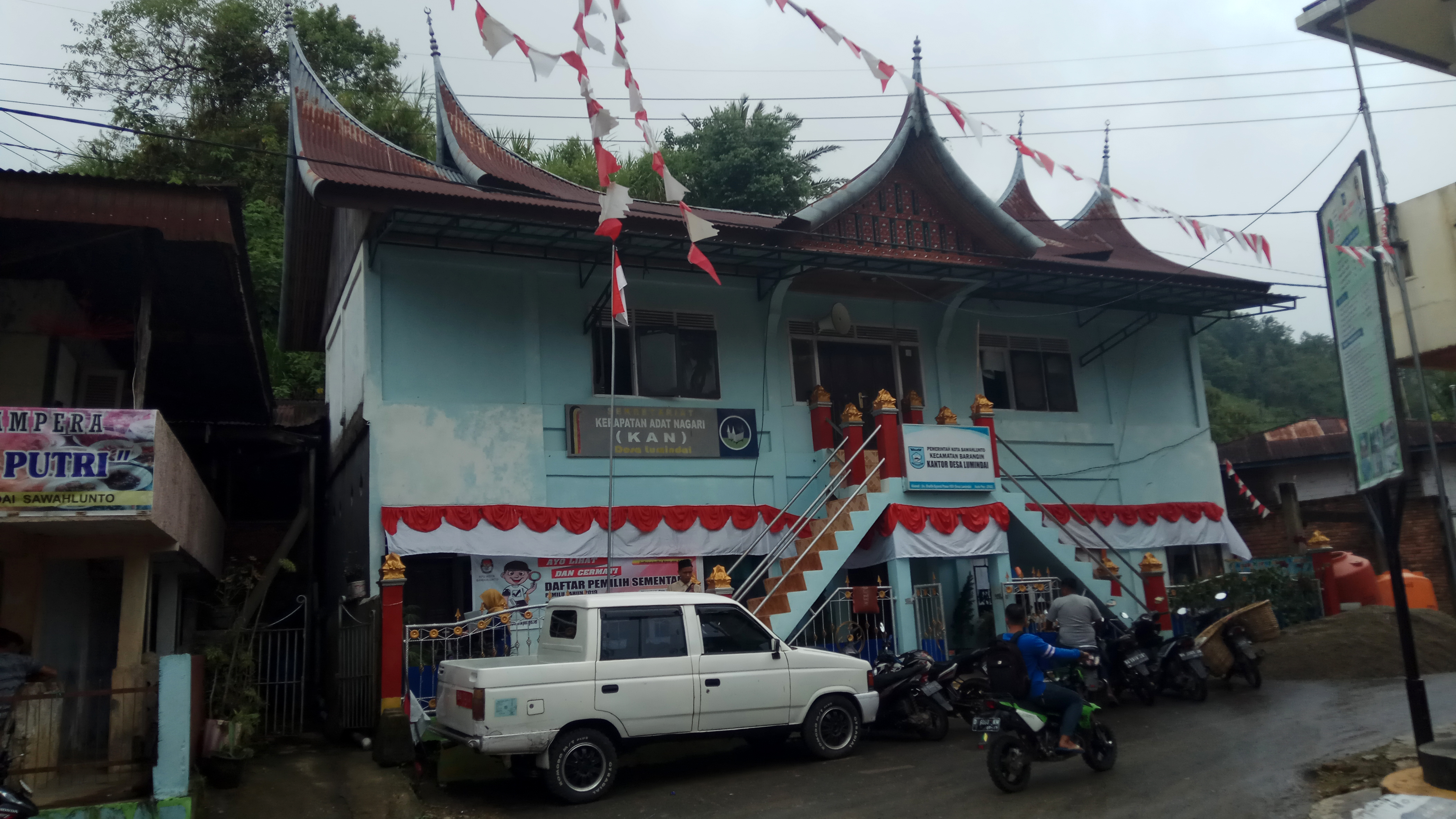 Kantor Kepala Desa Lumindai, Kecamatan Barangin, Kota Sawahlunto